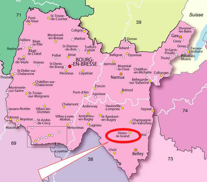 Carte de localisation de Virieu-le-Grand